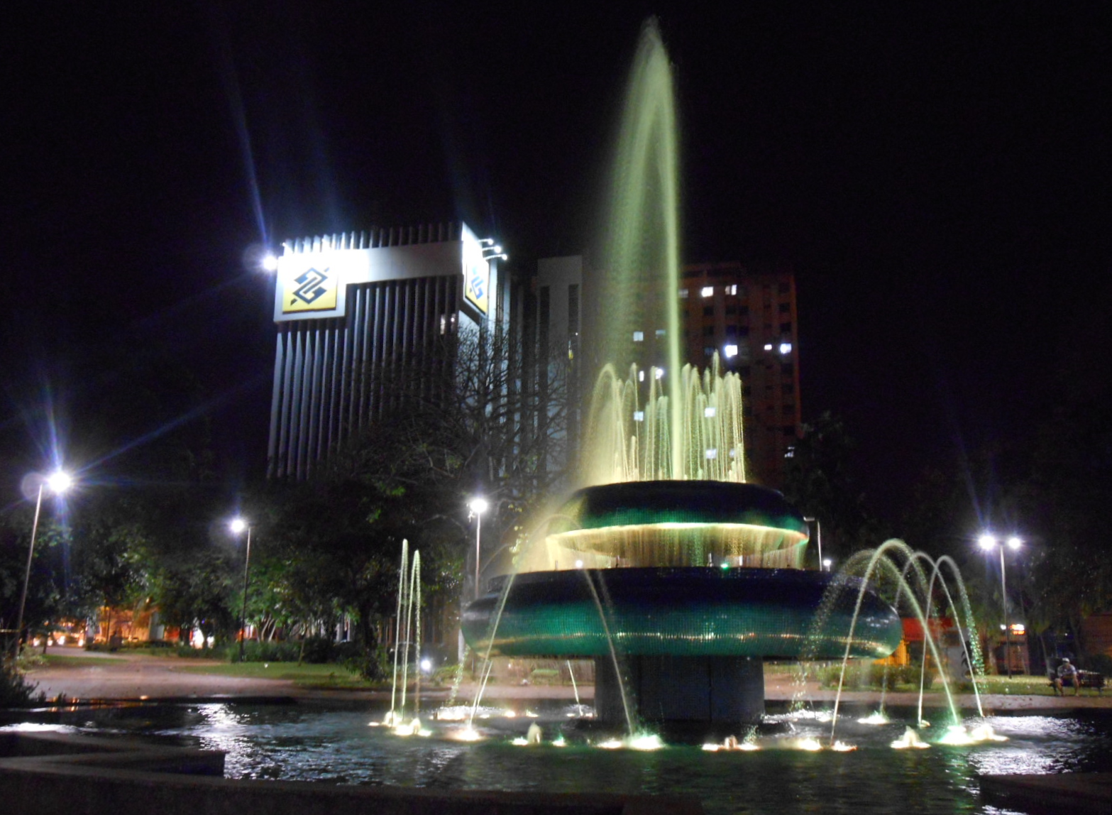 Praça Ary Coelho